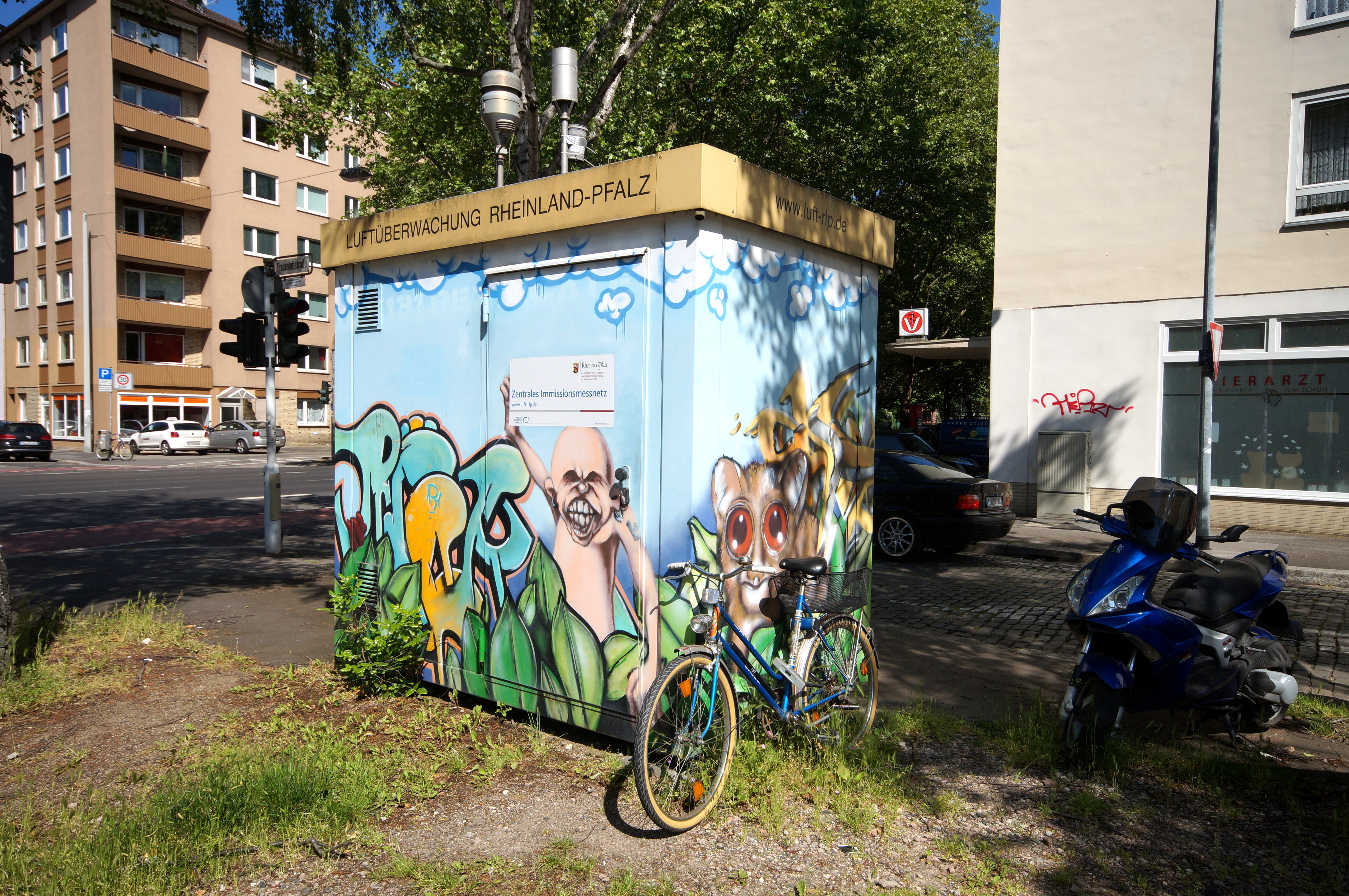 Luftmessstation der Luftüberwachung des rheinland-pfälzischen Landesamts für Umwelt, Wasserwirtschaft und Gewerbeaufsicht in der Frauenlobstraße an der Einmündung zur Rheinallee, Mainz